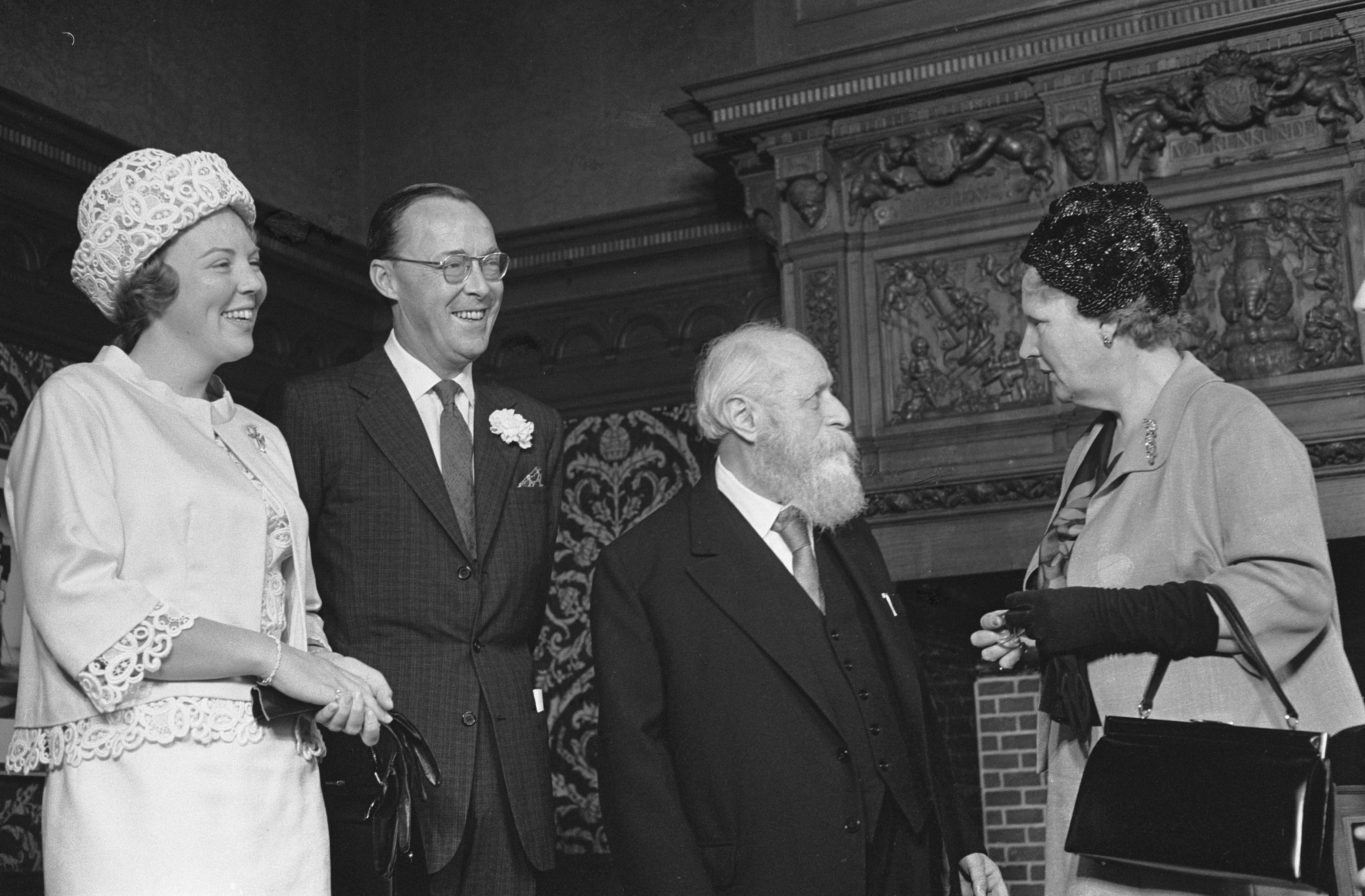 Collectie / Archief : Fotocollectie Anefo Reportage / Serie : Uitreiking van de Erasmusprijs 1963 aan professor Martin Buber in het Tropenmuseum in Amsterdam Beschrijving : Professor Buber in gesprek met koningin Juliana, links prins Bernhard Datum : 3 juli 1963 Locatie : Amsterdam, Noord-Holland Trefwoorden : filosofen, koninginnen, prijsuitreikingen, prinsen Persoonsnaam : Bernhard (prins Nederland), Buber, Martin, Juliana (koningin Nederland) Instellingsnaam : Tropenmuseum Fotograaf : Fotograaf Onbekend / Anefo, [onbekend] Auteursrechthebbende : Nationaal Archief Materiaalsoort : Negatief (zwart/wit) Nummer archiefinventaris : bekijk toegang 2.24.01.05 Bestanddeelnummer : 915-3276